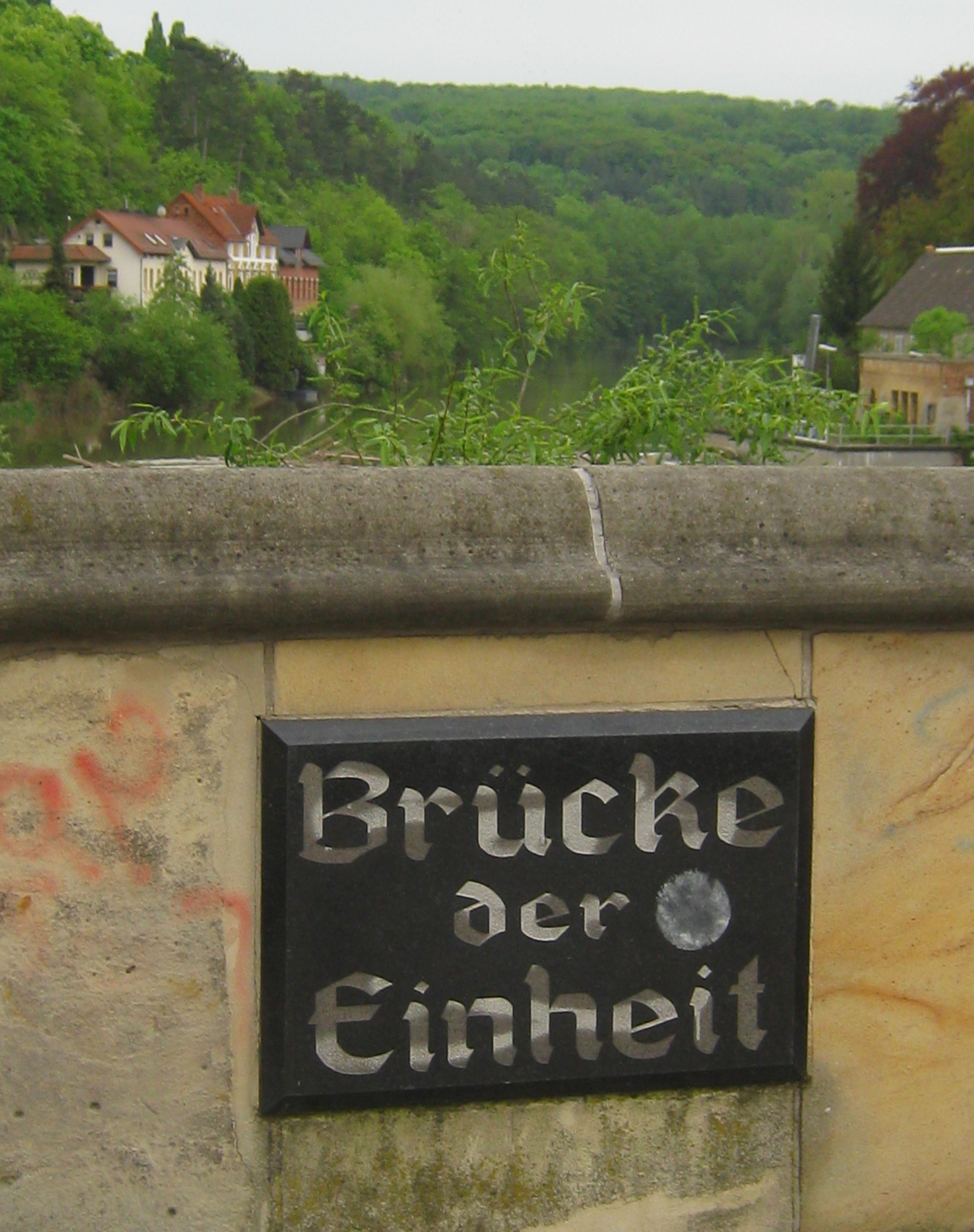 Erinnerungstafel an der Saalebrücke in Bad Kösen zur Deutschen Reichsgründung (1871)